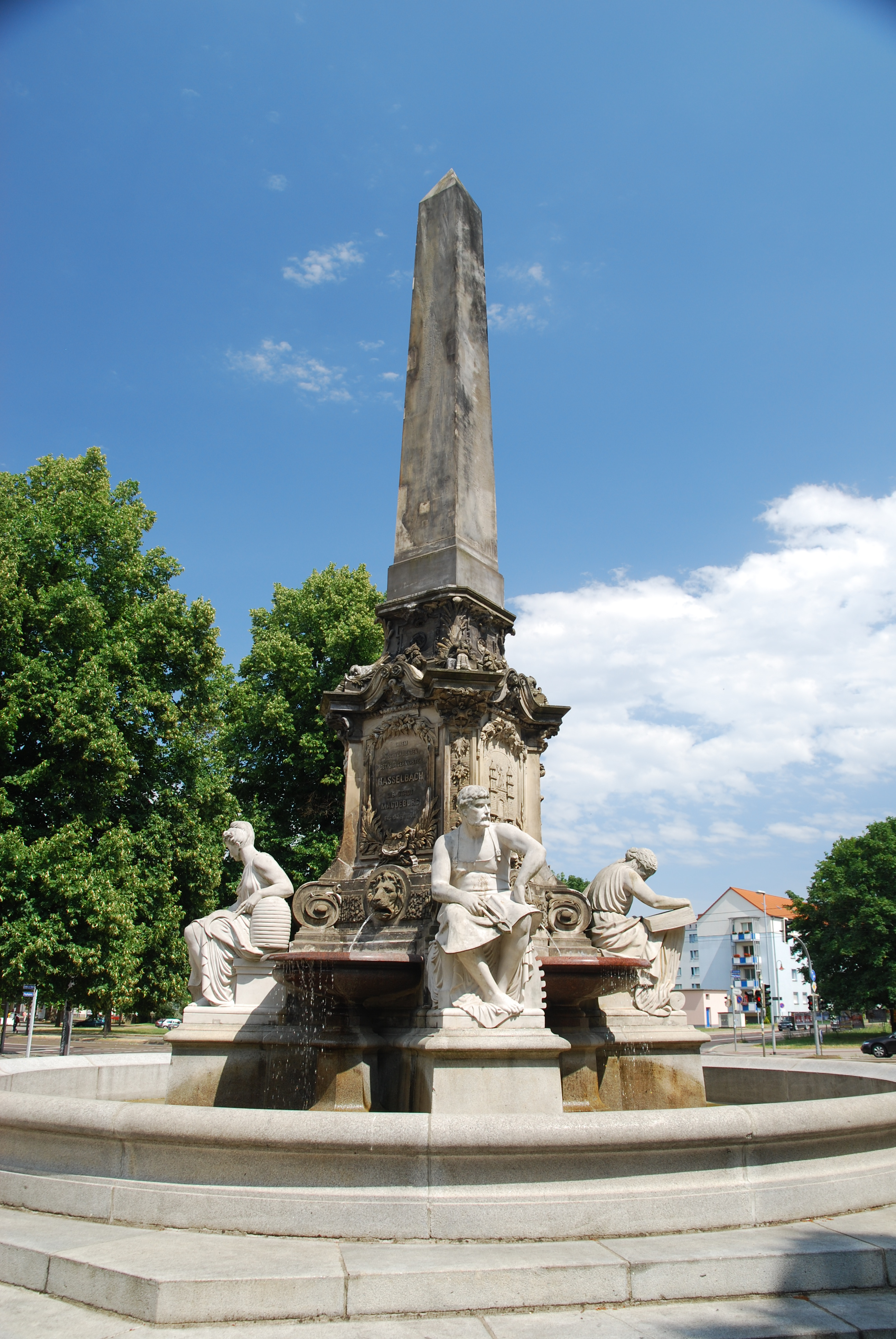 Hasselbachbrunnen in Magdeburg